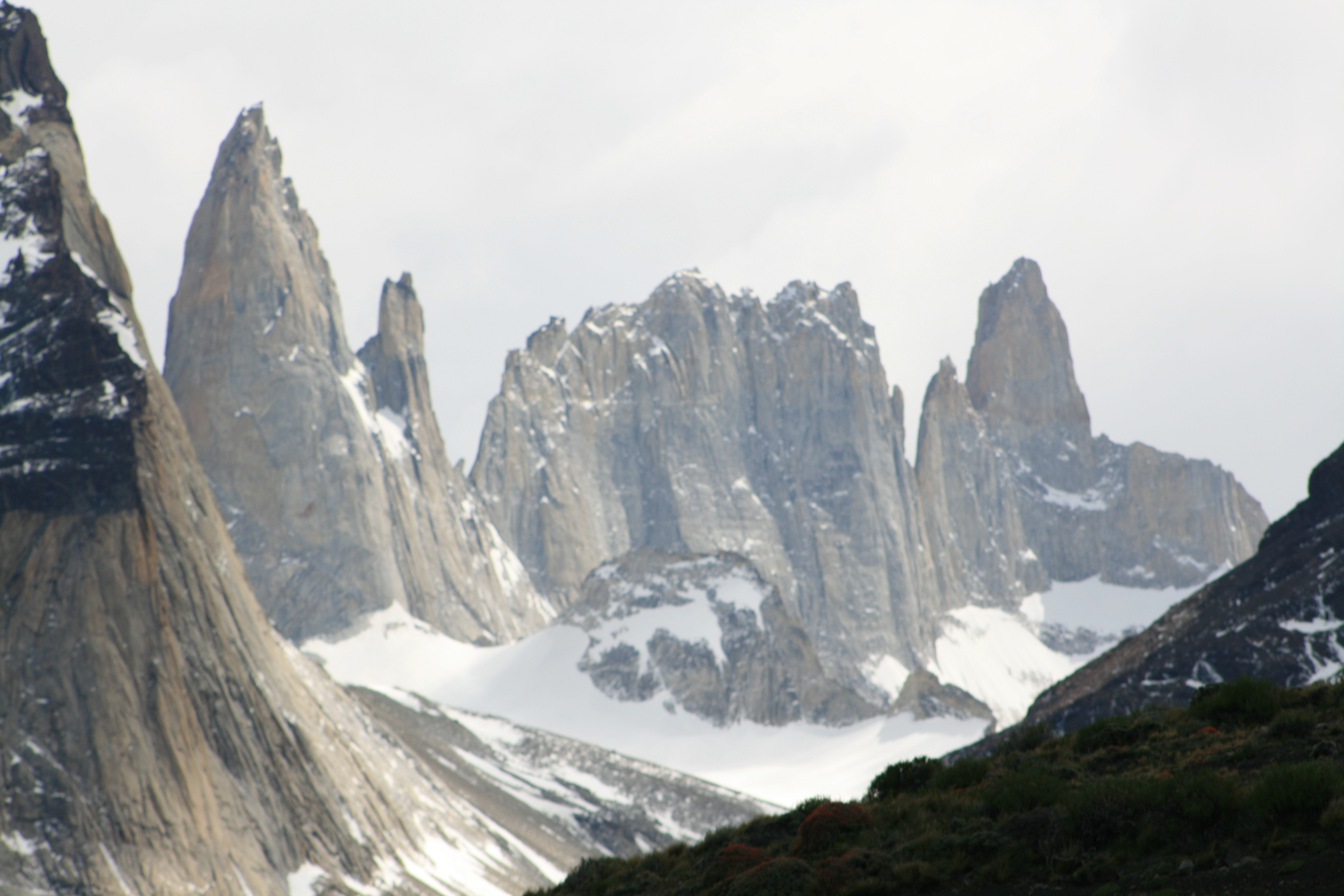 Vista de las Torres del Paine